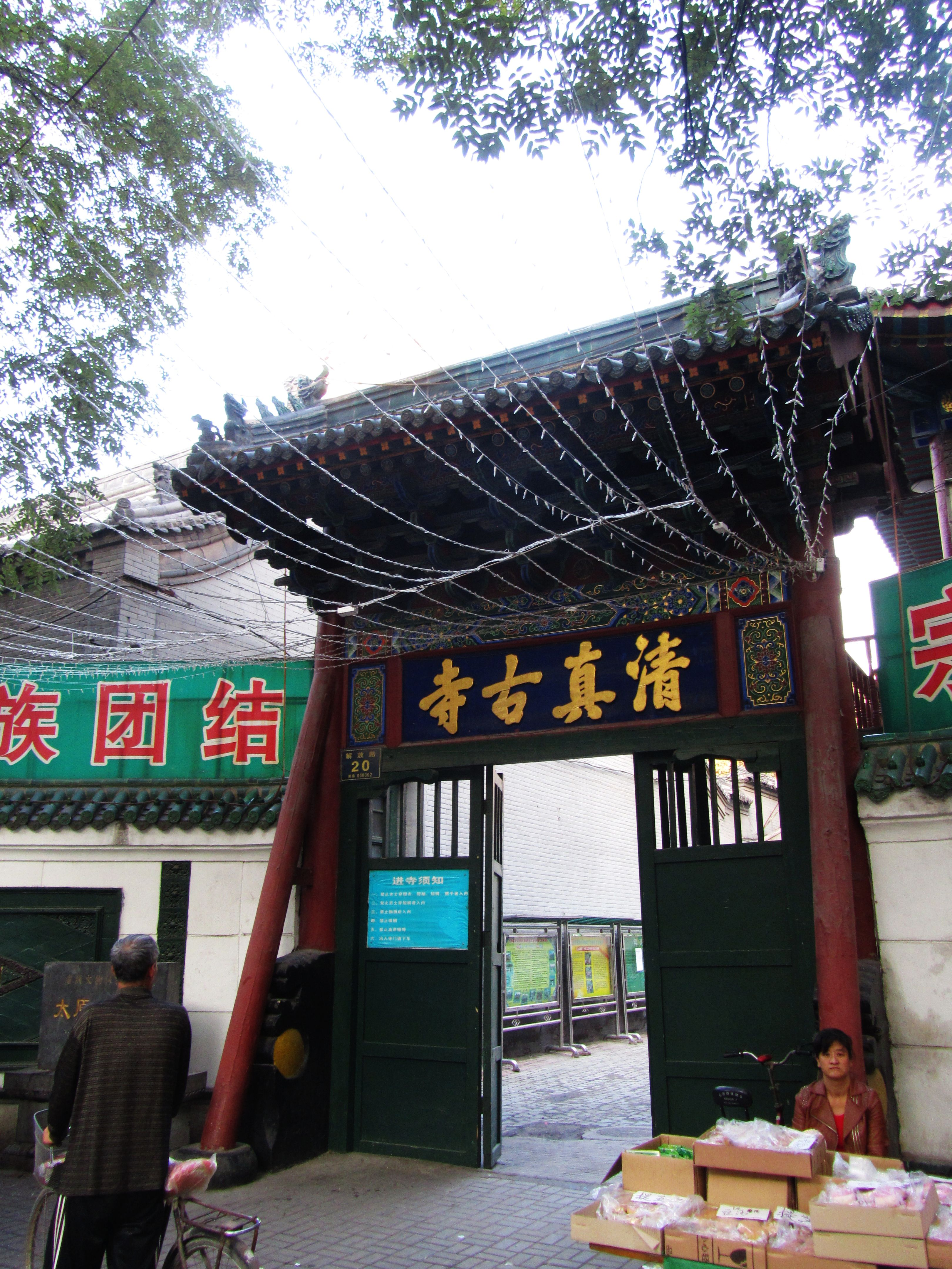 太原清真古寺沿解放路门（西门）。